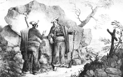 Aduaneros Carlistas. "Albúm de las Tropas Carlistas del Norte". Madrid, sin fecha. (184?)